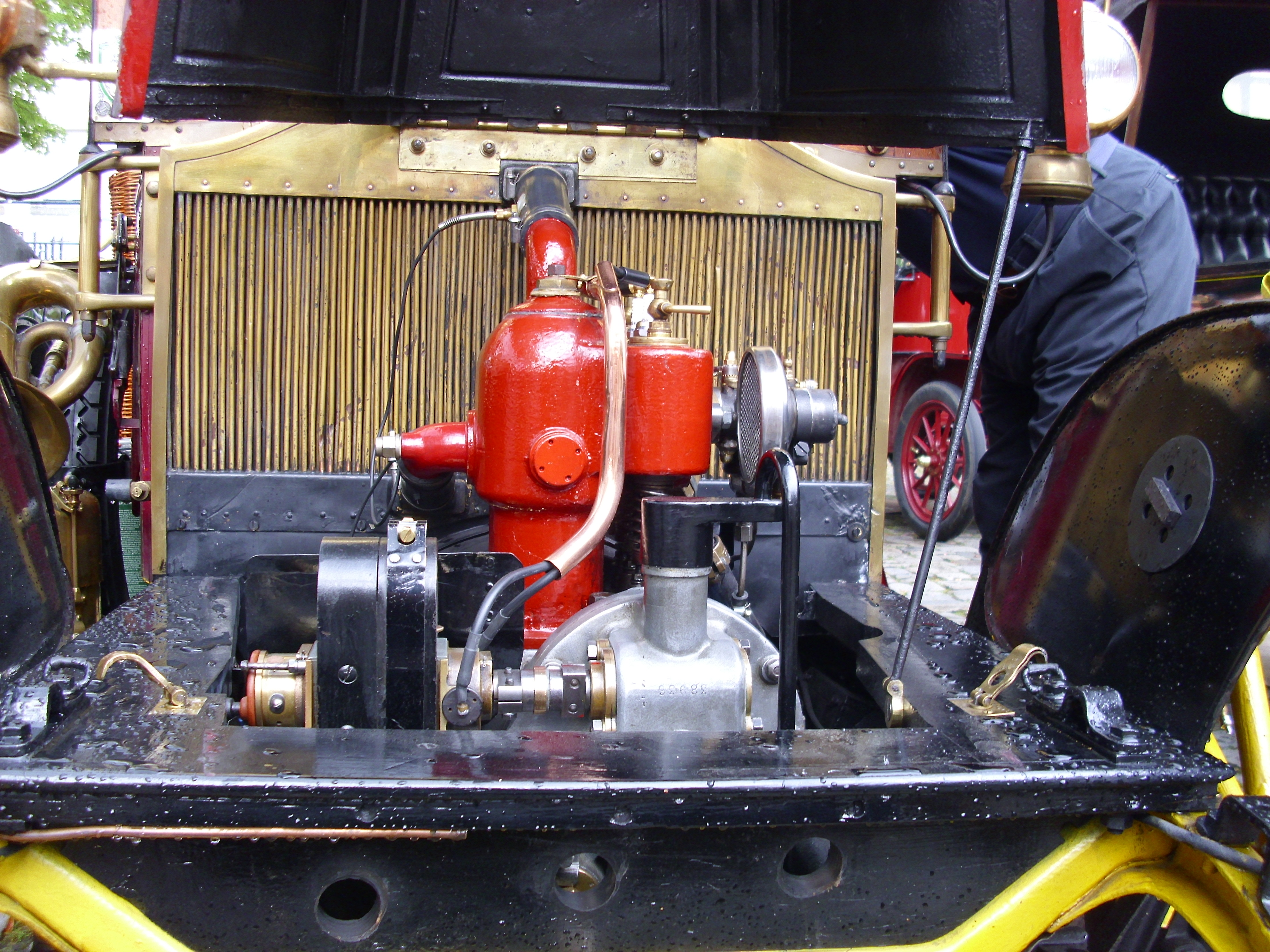 Motor eines Renault Type AX von 1911